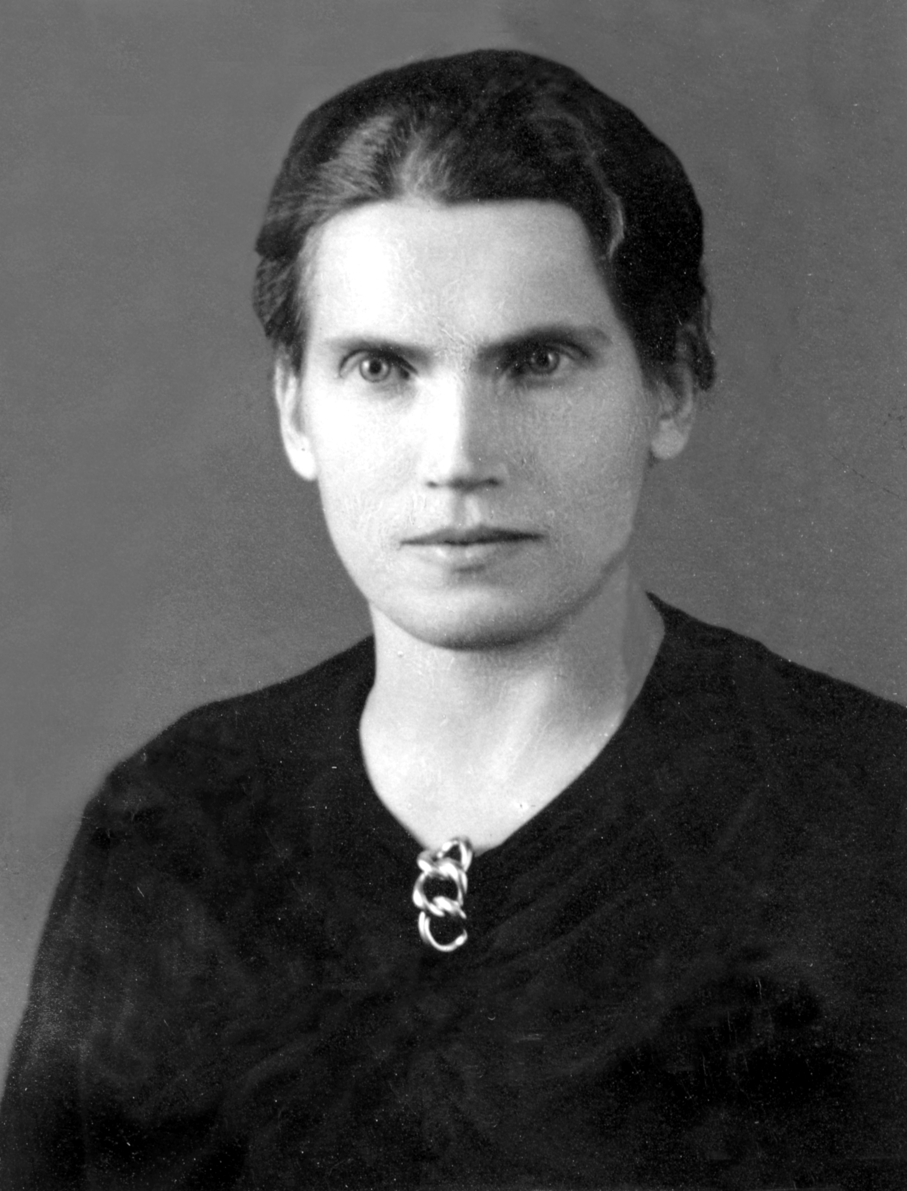 Hornjoserbsce: Pasowy wobrazk Marje Kubašec.